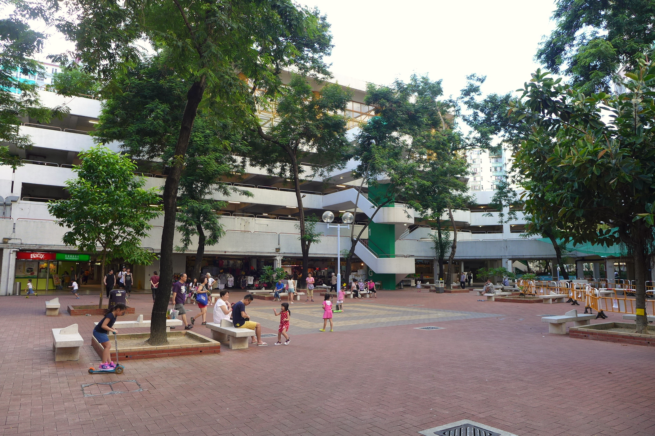 Kai Yip Estate Plaza